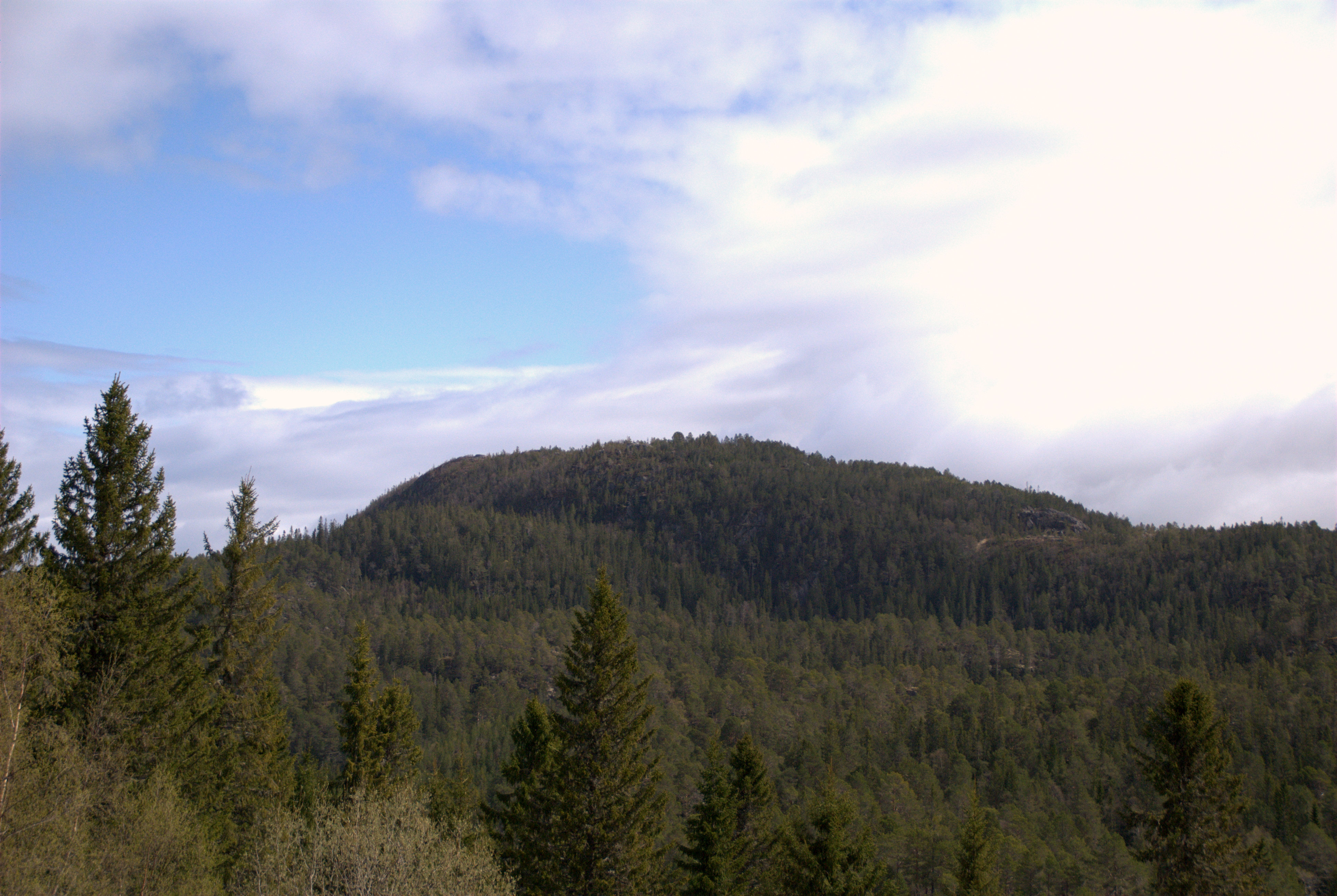 Geitfjellet i Bymarka i Trondheim, sett fra Nydammen.